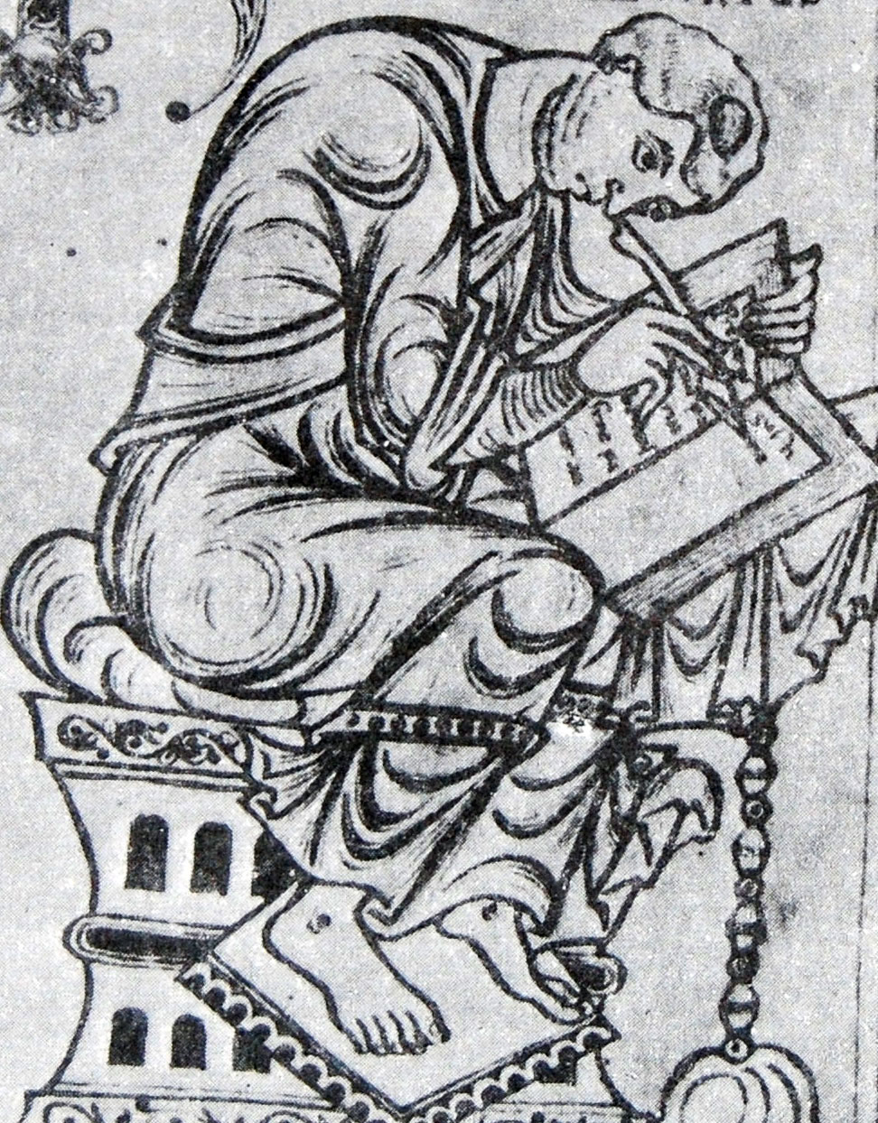 Paulo Orosio representado en una miniatura perteneciente al códice de Saint-Epure.